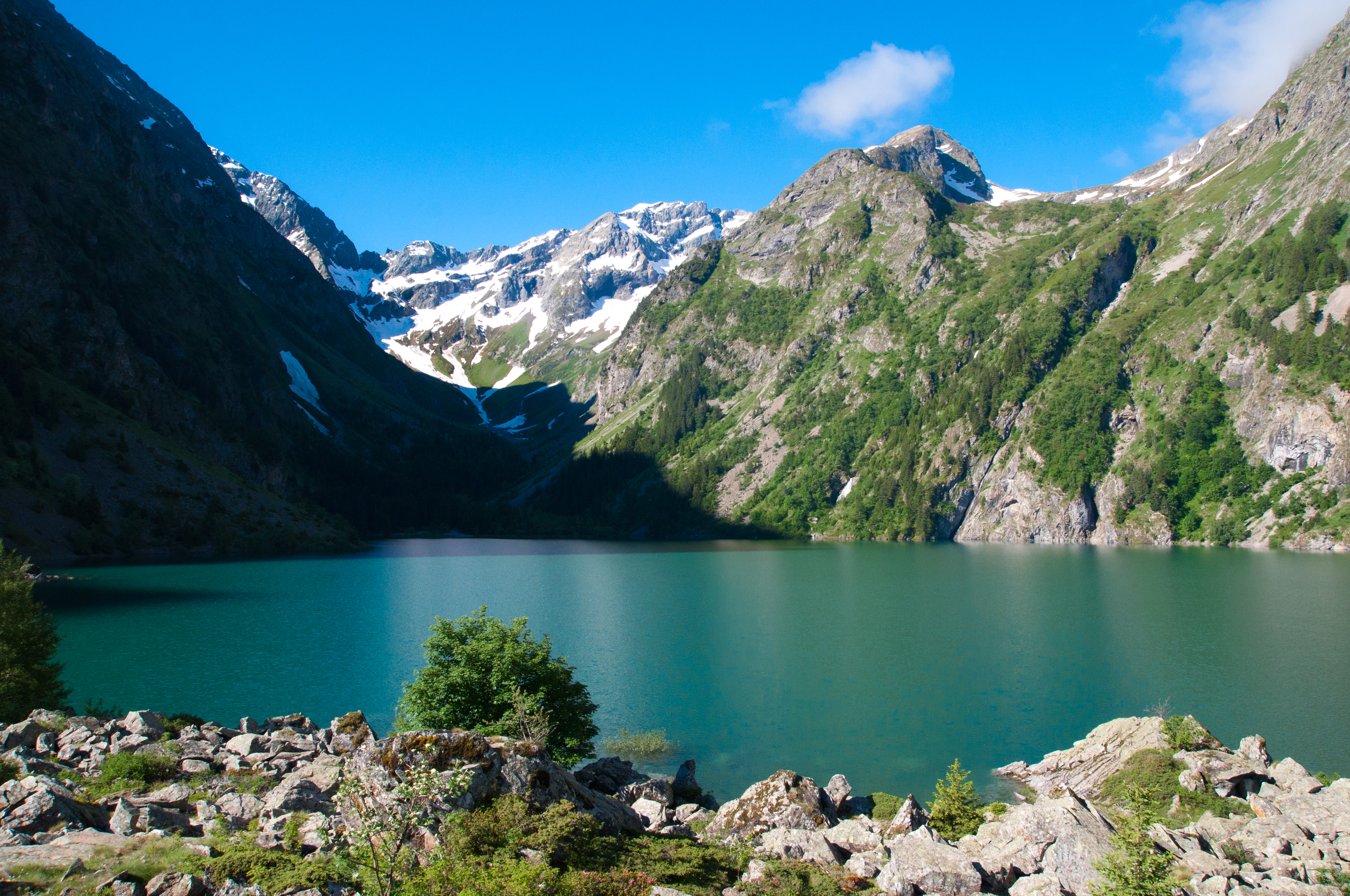 Lac du Lauvitel